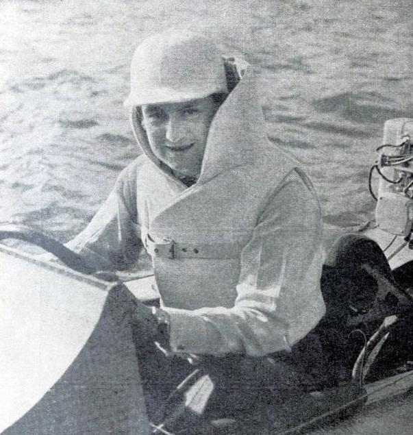 Jean Dupuy en 1934.